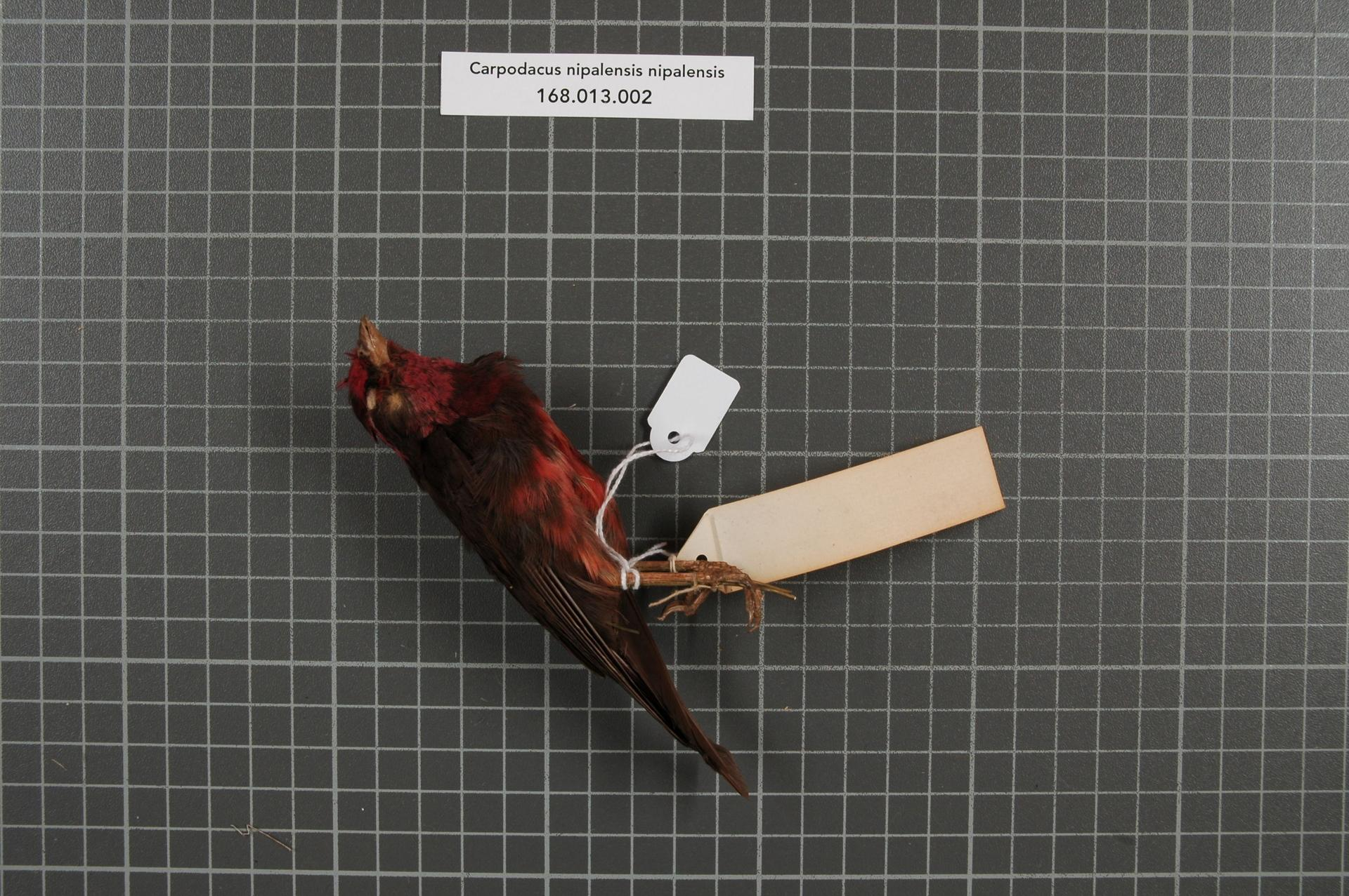 Carpodacus nipalensis nipalensis (Hodgson, 1836)